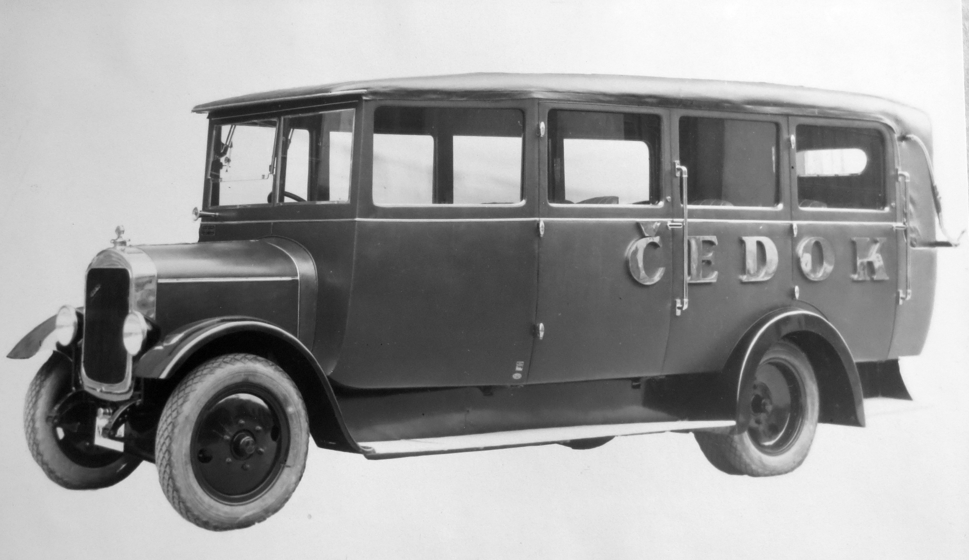 Walter Commercial, autobus Čedok (1930)